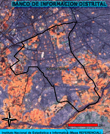 Imagen Satelital del distrito de Jose Luis Bustamante y Ribero